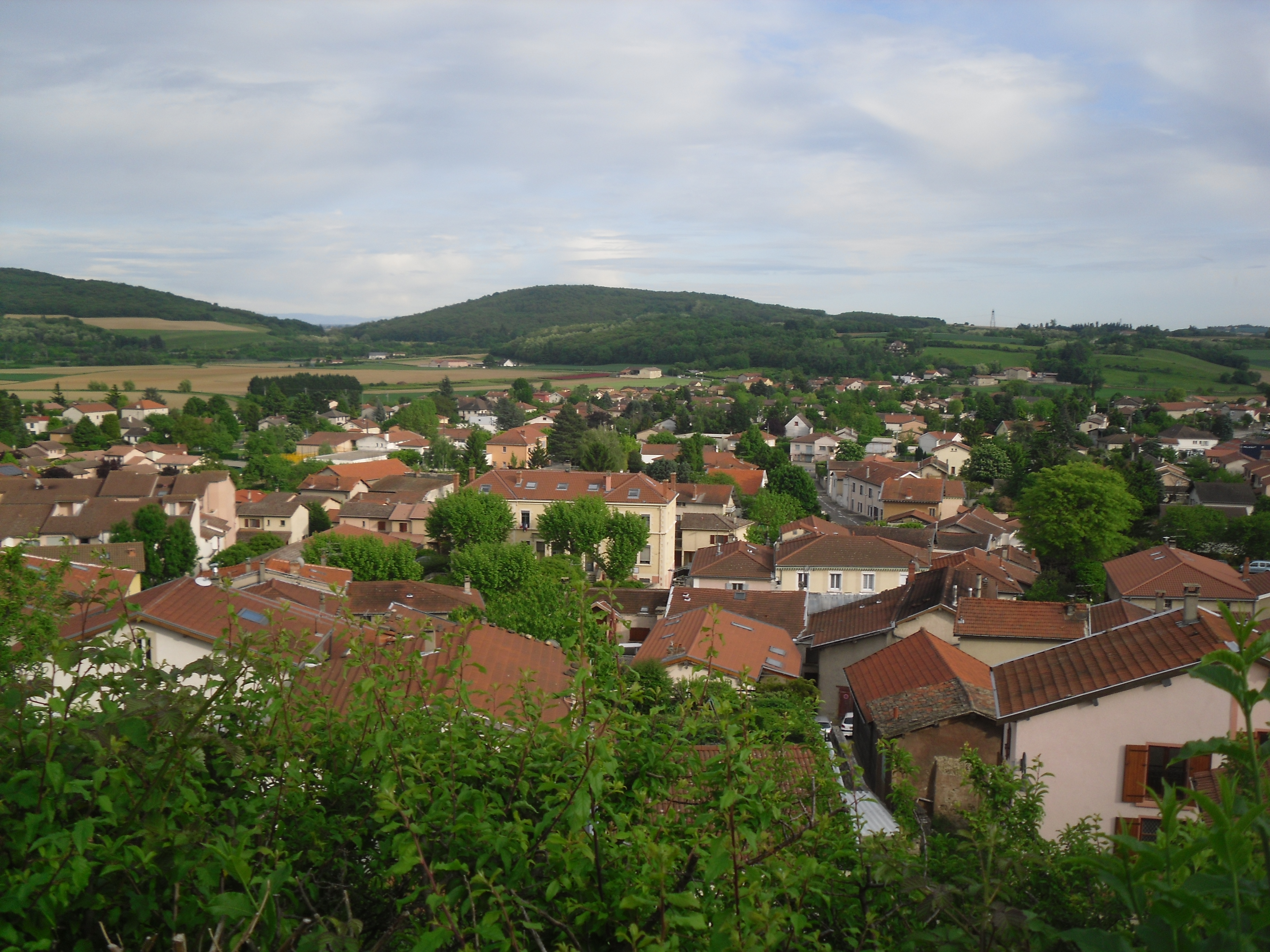 Vue du village depuis le parvis de l'église